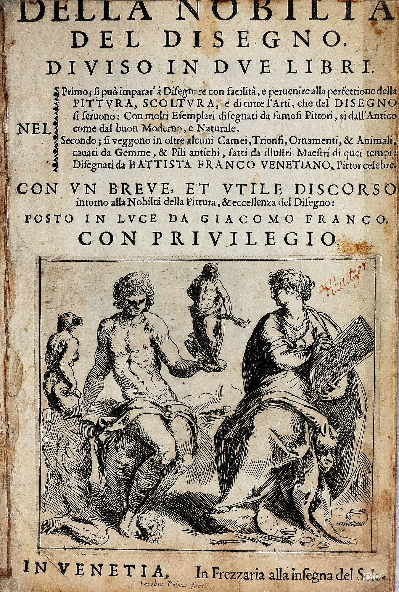 Titelblatt des Buches "Della Nobiltà Del Disegno, : Diviso In Dve Libri, Nel Primo, si può imparar' à Disegnare con facilità ... Secondo; si veggono in oltre alcuni Camei, Trionfi, Ornamenti, & Animali, cauati da Gemme, & Pili antichi ... / Disegnati da Battista Franco Venetiano, ... Con Vn Breve, Et Vtile Discorso intorno alla Nobiltà della Pittura, & eccellenza del Disegno: Posto In Lvce Da Giacomo Franco. Venedig: In Frezzaria alla insegna del Sole, [1611]. Wissenschaftliche Stadtbibliothek Mainz. Signatur: III i 2° 142 a (Rarum). Auf dem Exemplar der Wissenschaftlichen Stadtbibliothek Mainz findet man unteren Rand des Titelblattes den Hinweis: "Iacobus Palma fecit".